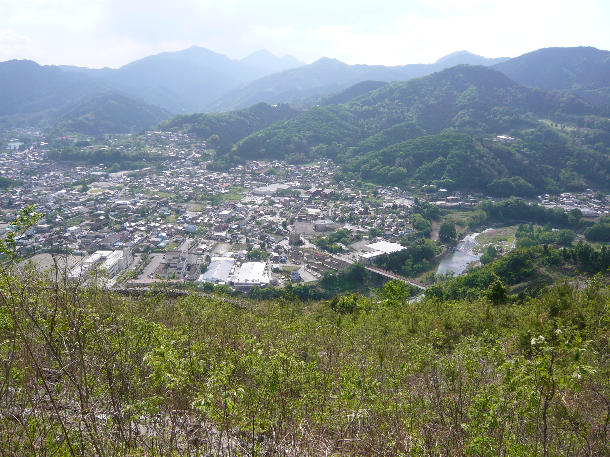 採石所の上から鬼石町を見下ろす